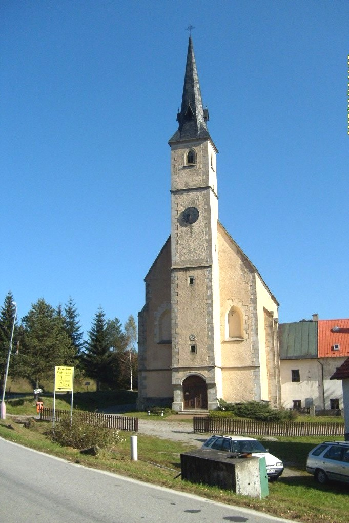 Kostel v Přední Výtoni